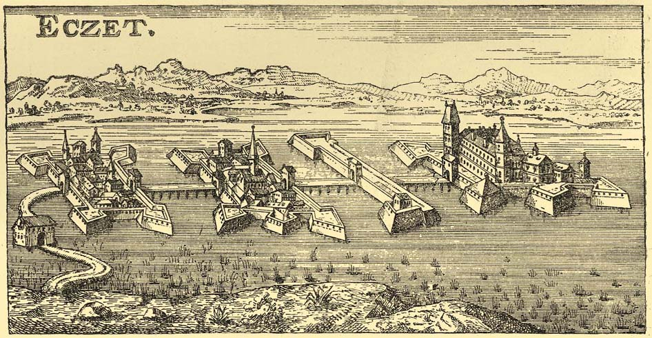 Ecsed vára a XVII. században. Egykorú metszet után. Éble Gábor „Az ecsedi uradalom és Nyiregyháza” (Budapest, 1898.) cimű munkájának reprodukcioja után